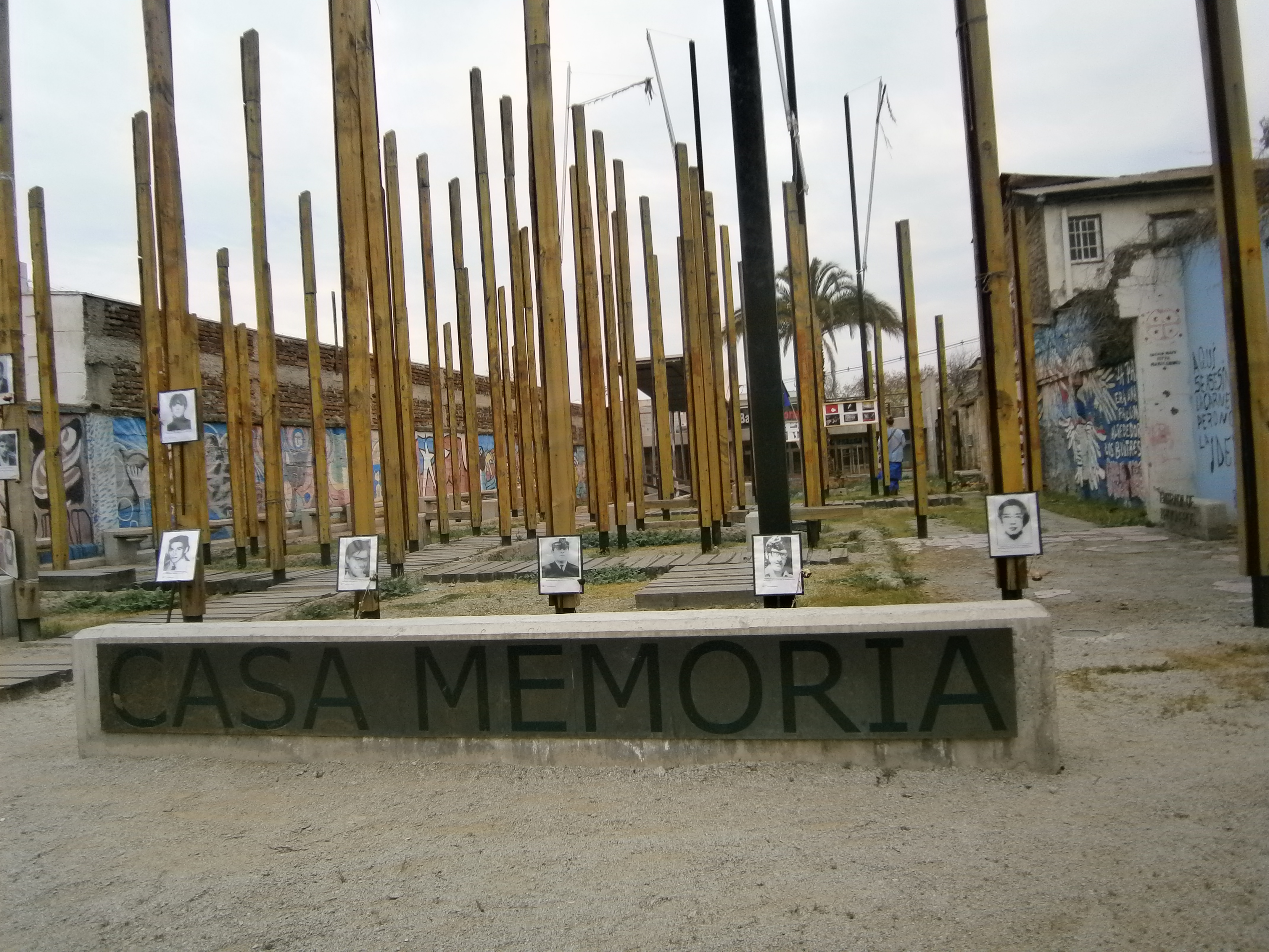 Sitio histórico ubicado en Av. José Domingo Cañas Nº 1367 This is a photo of a national monument in Chile: 481